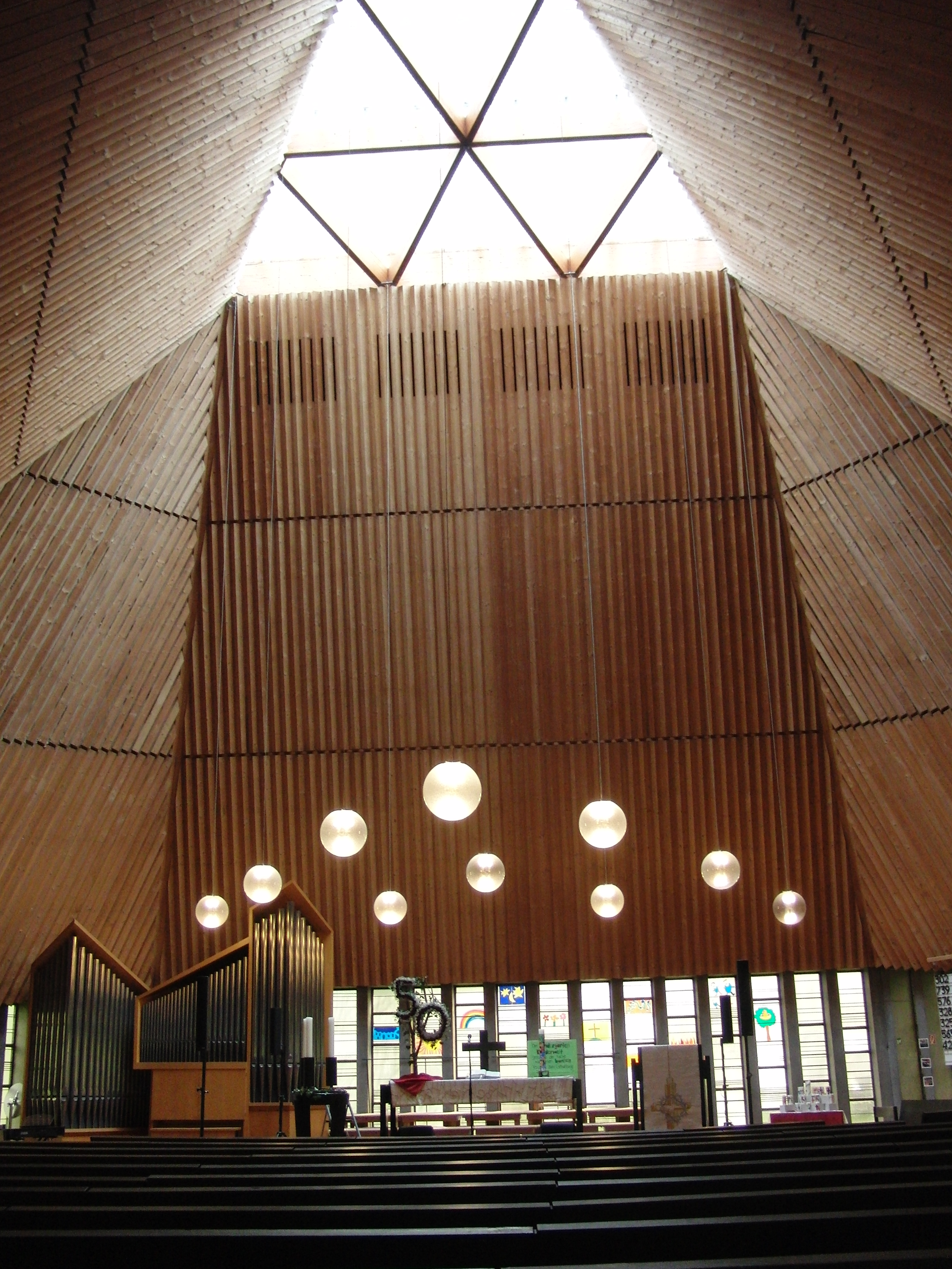 Kirchenraum Mai 2017 kurz nach dem Jubiläum 50 Jahre Jubilatekirche